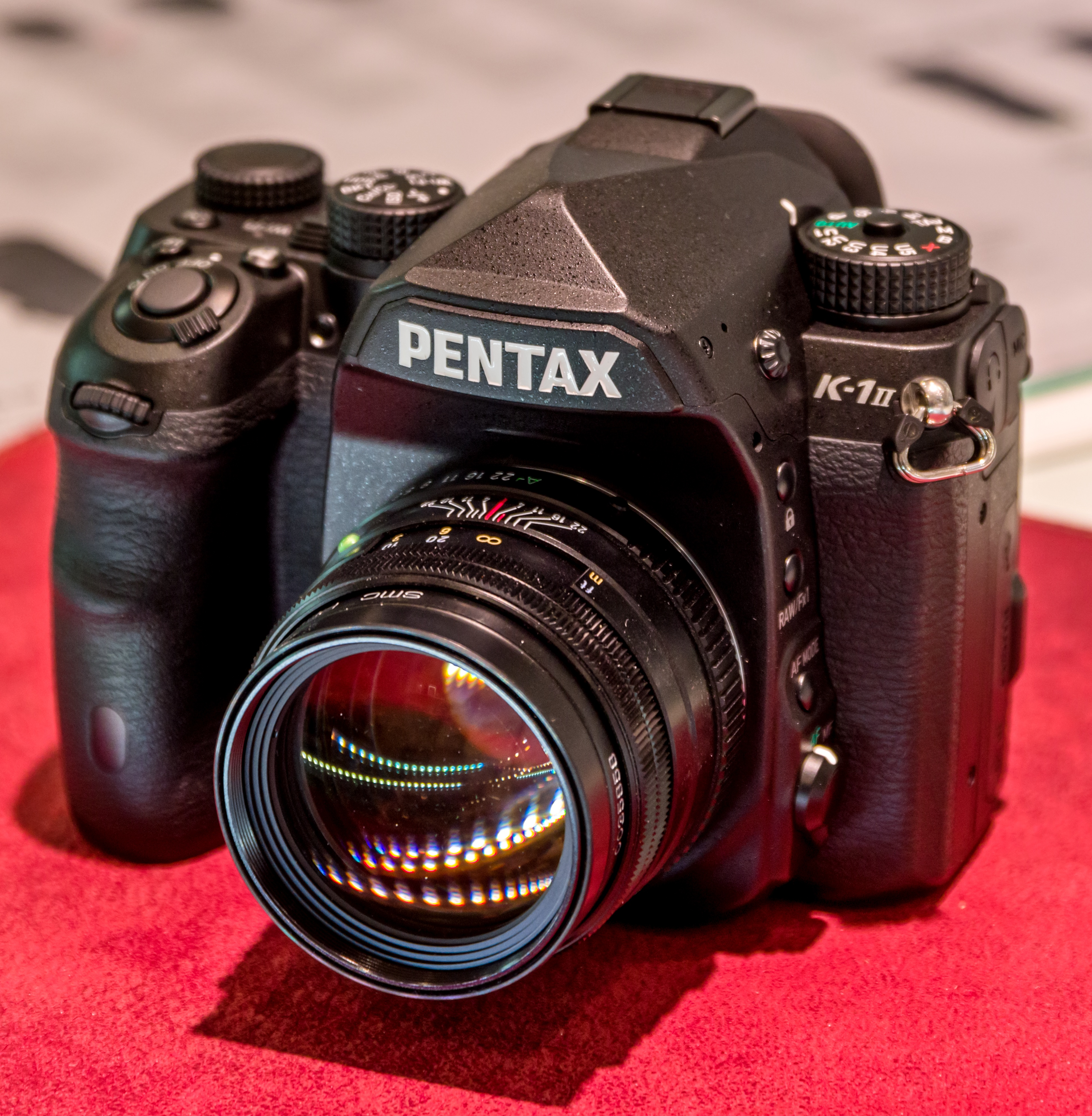 Pentax K-1 II mit Pentax FA 77mm 1.8 Limited Aufgenommen bei Ringfoto Löffler Freiburg Vielen Dank für die Gelegenheit, die Kamera bei ihnen im Geschäft zu fotografieren.